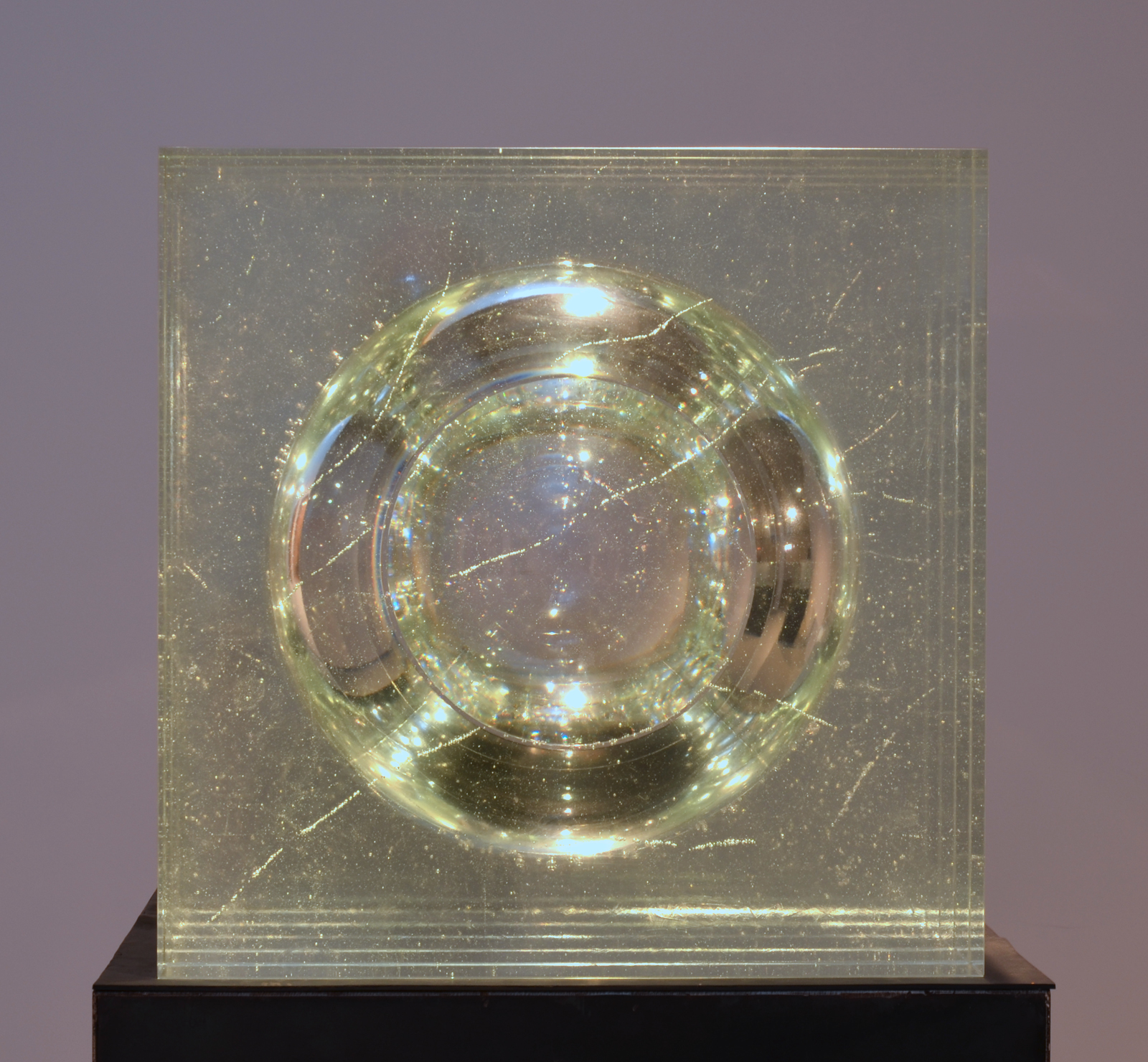 Stanislav Libenský, Jaroslava Brychtová, Koule v krychli, 1990